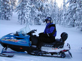 Snowmobile